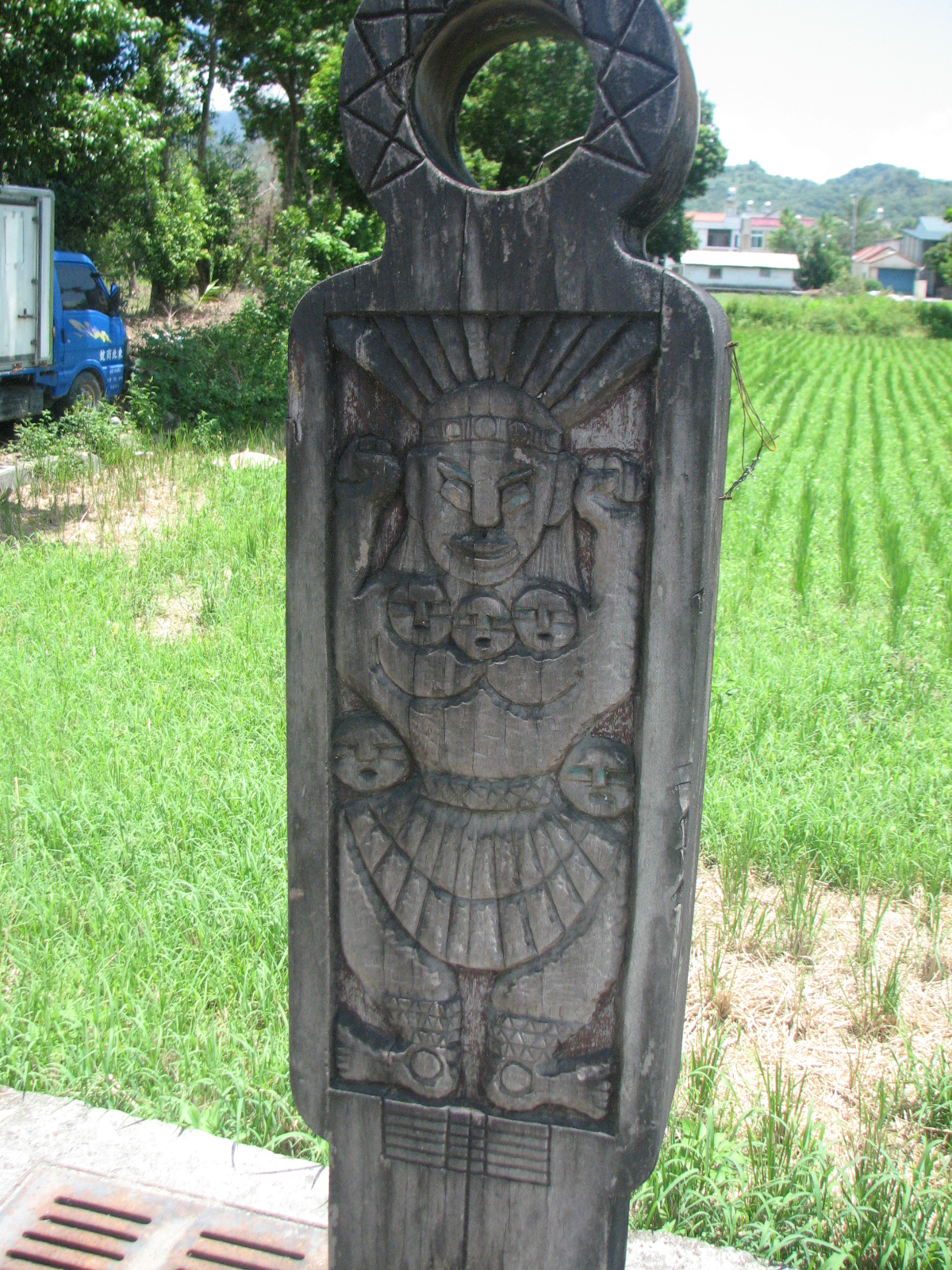 中文（台灣）: 位於太巴塱部落內的造景木雕